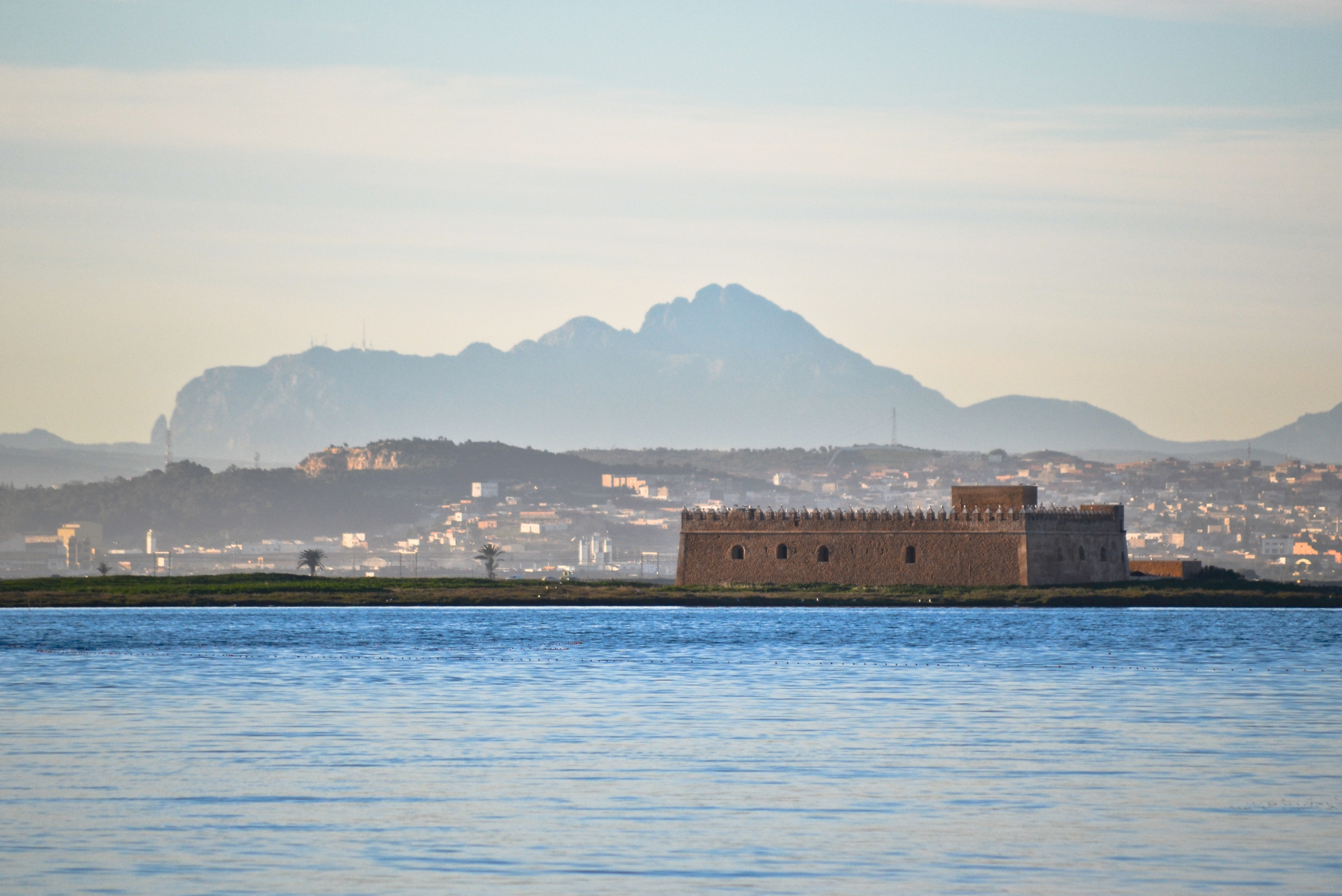 Fort espagnol, Chikly